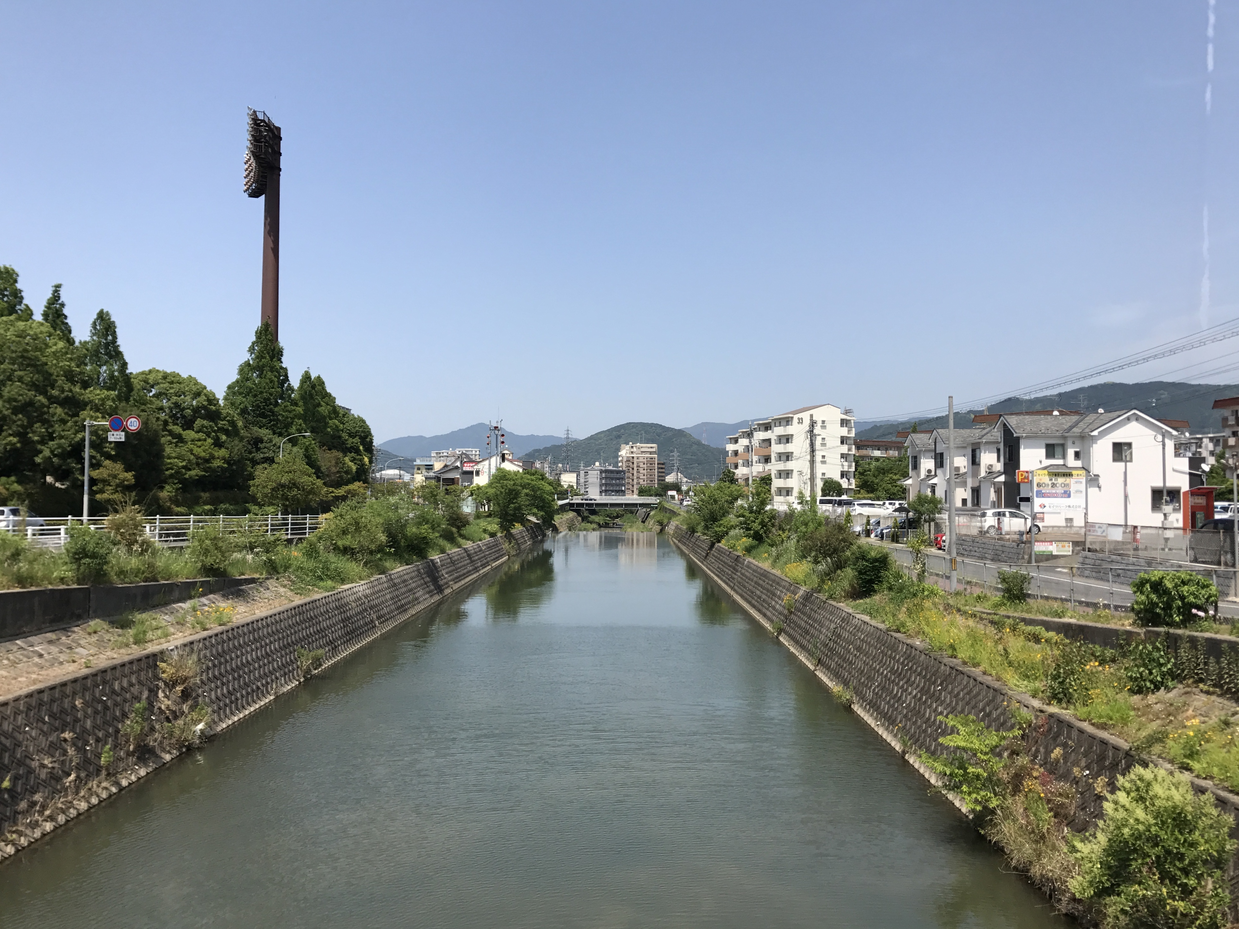 公園前橋より望む牛頸川(下流側)